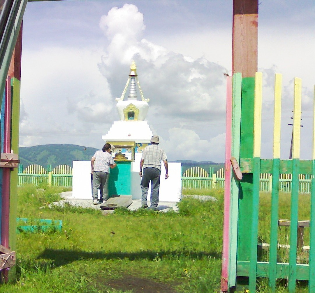 Мылинский субурган